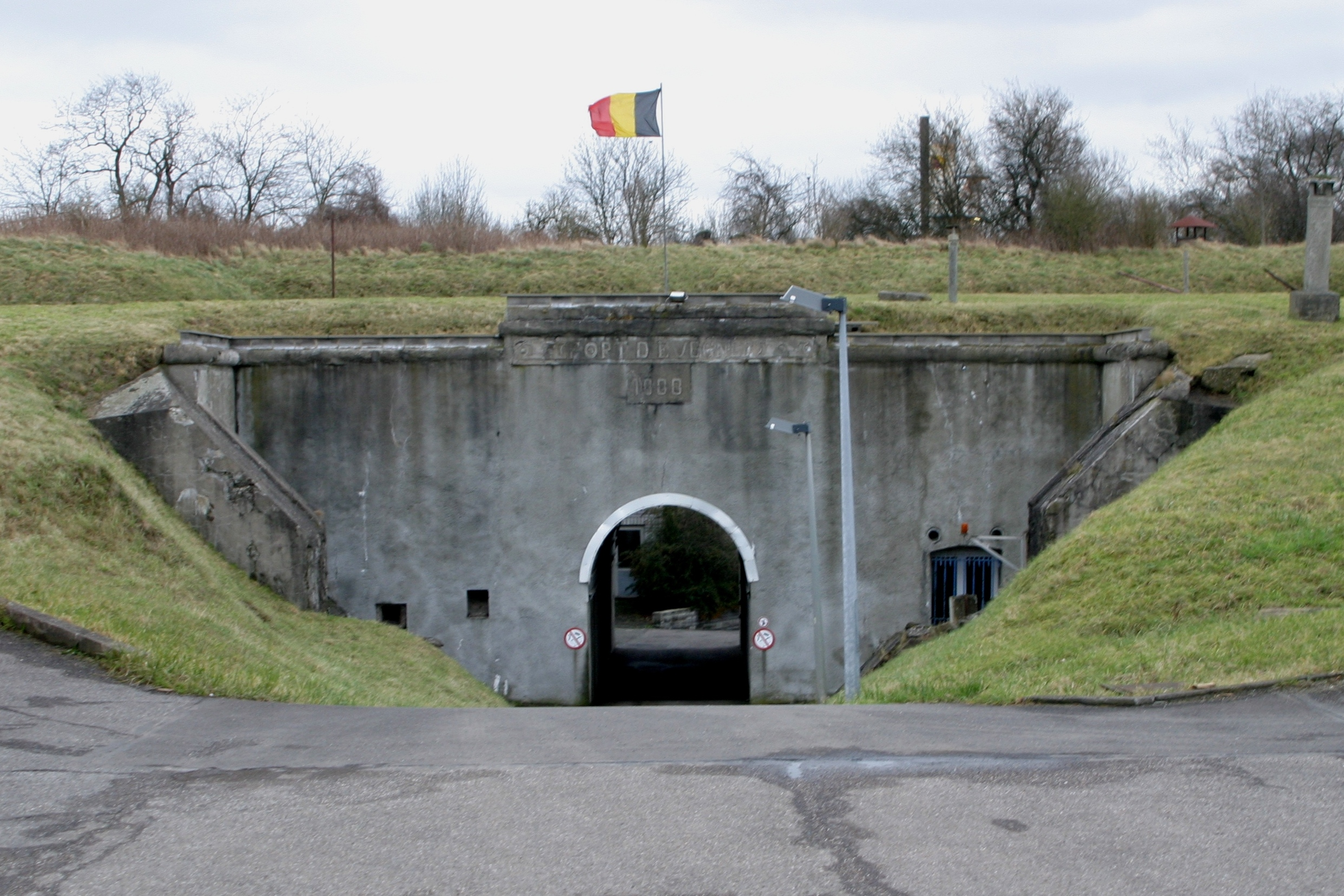 Entreé vum Fort dEvegnée-Tignée.